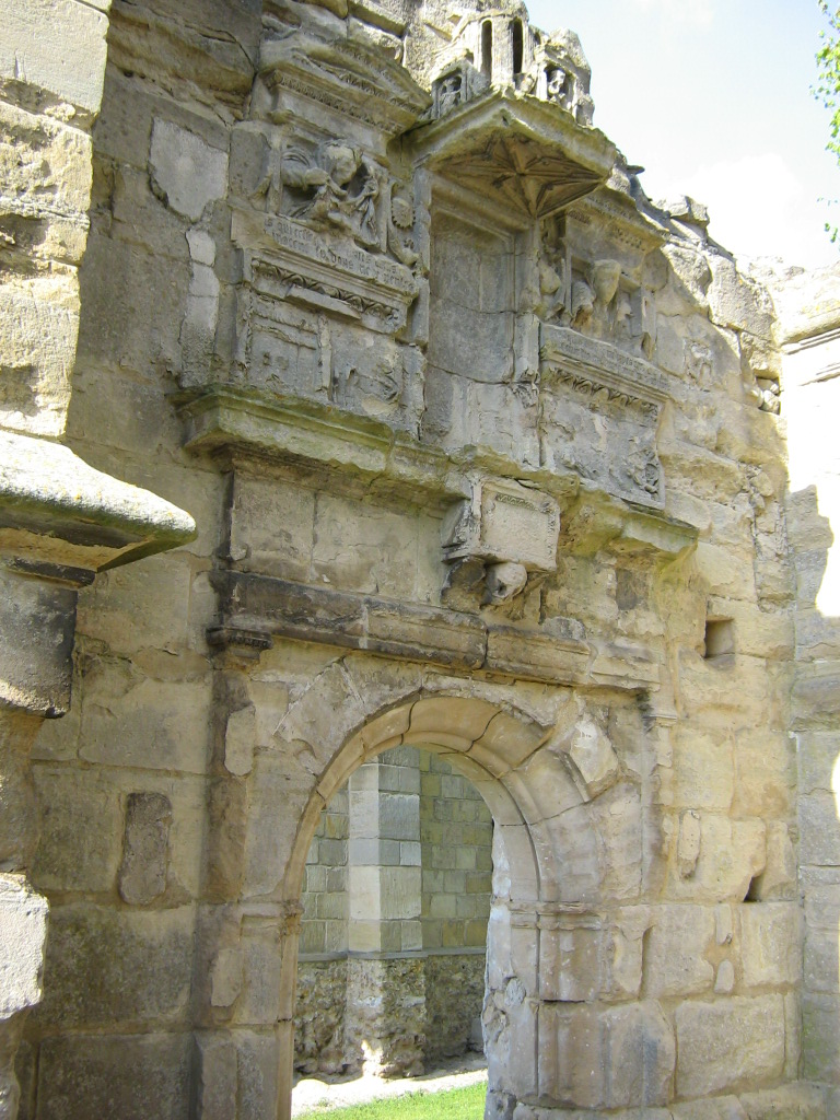 Porche d'entrée de l'ancienne église de Génicourt du XIIème siècle, visible aujourd'hui sur les vestiges jouxtant le nouvel édifice datant de 1905.